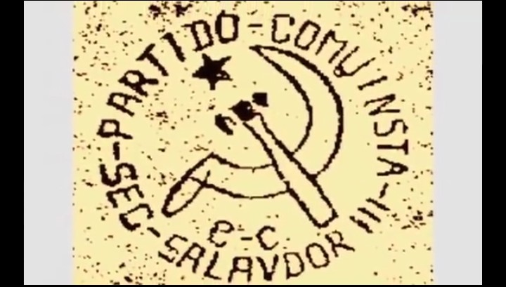 Un antiguo panflento del partido comunista de el salvador 1930s.